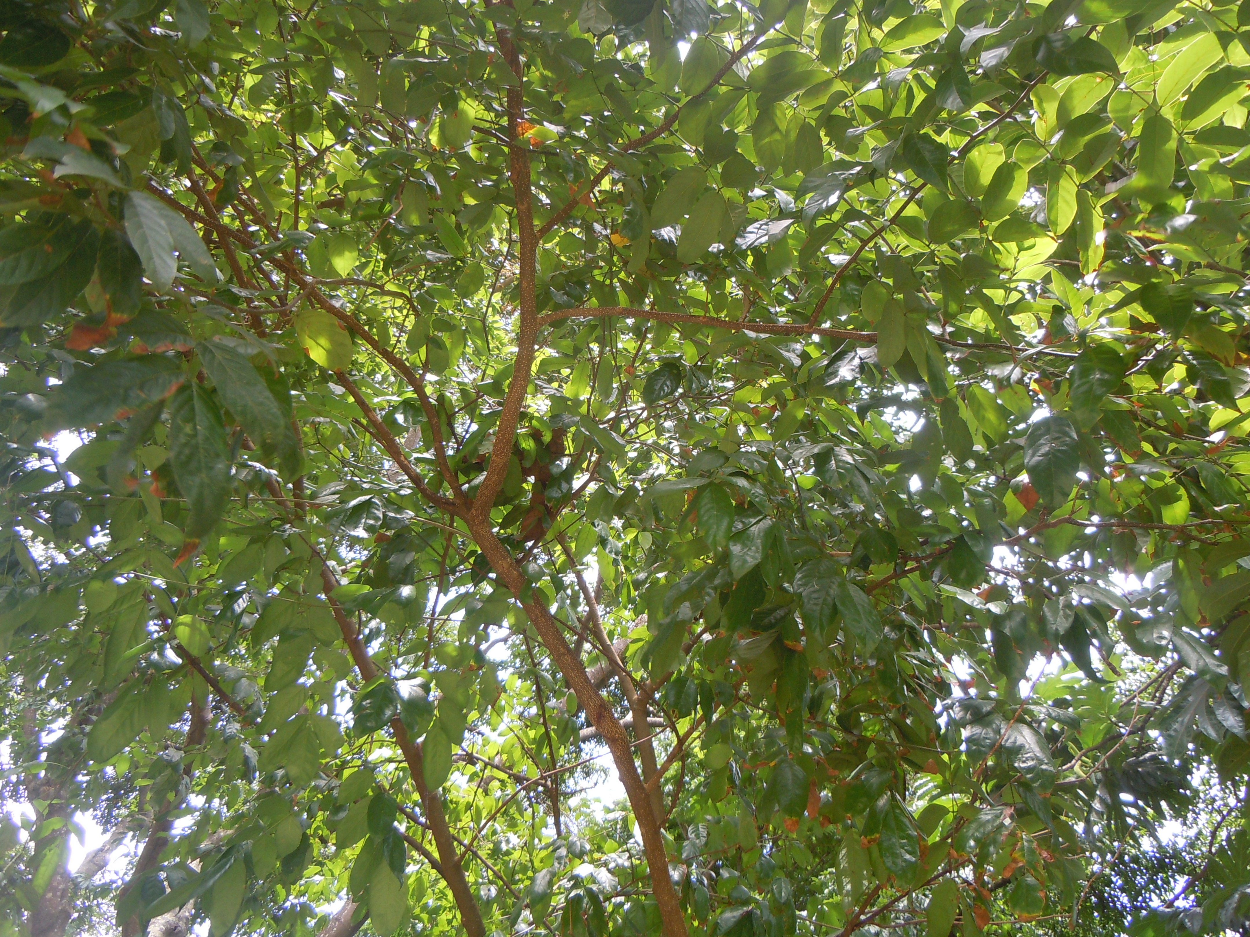 Chimarrhis cymosa - Bois rivière - planté dans le parc de l' Habitation Clément en Martinique.